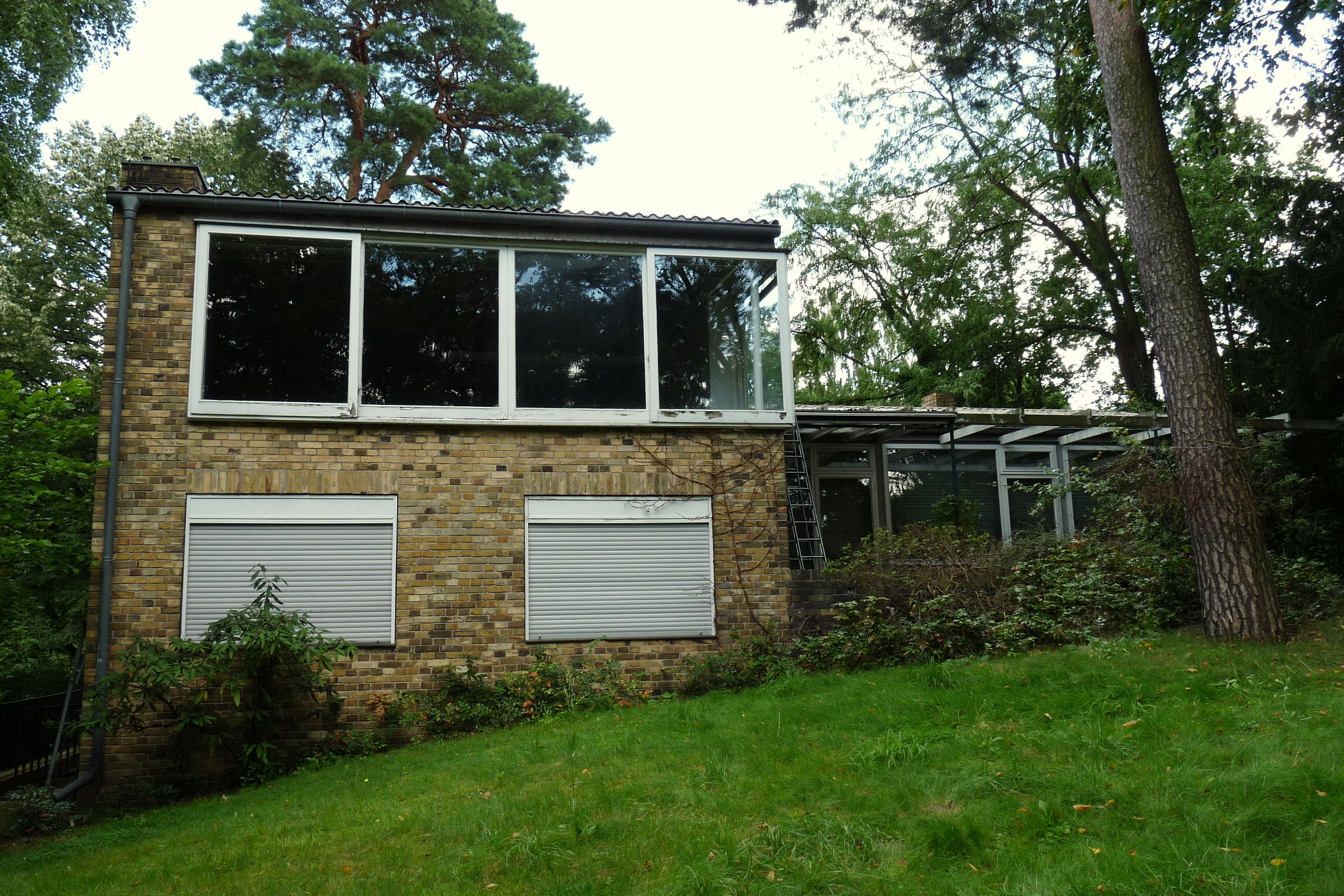 Wohnhaus des Architecten Norman Braun 1956/1957